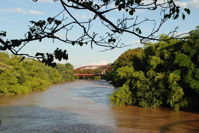 Rio Moji-Guaçu cortando a cidade de Mogi-Guaçu, sendo possível ver a famosa "Ponte de Ferro" ou "Ponte Vermelha".